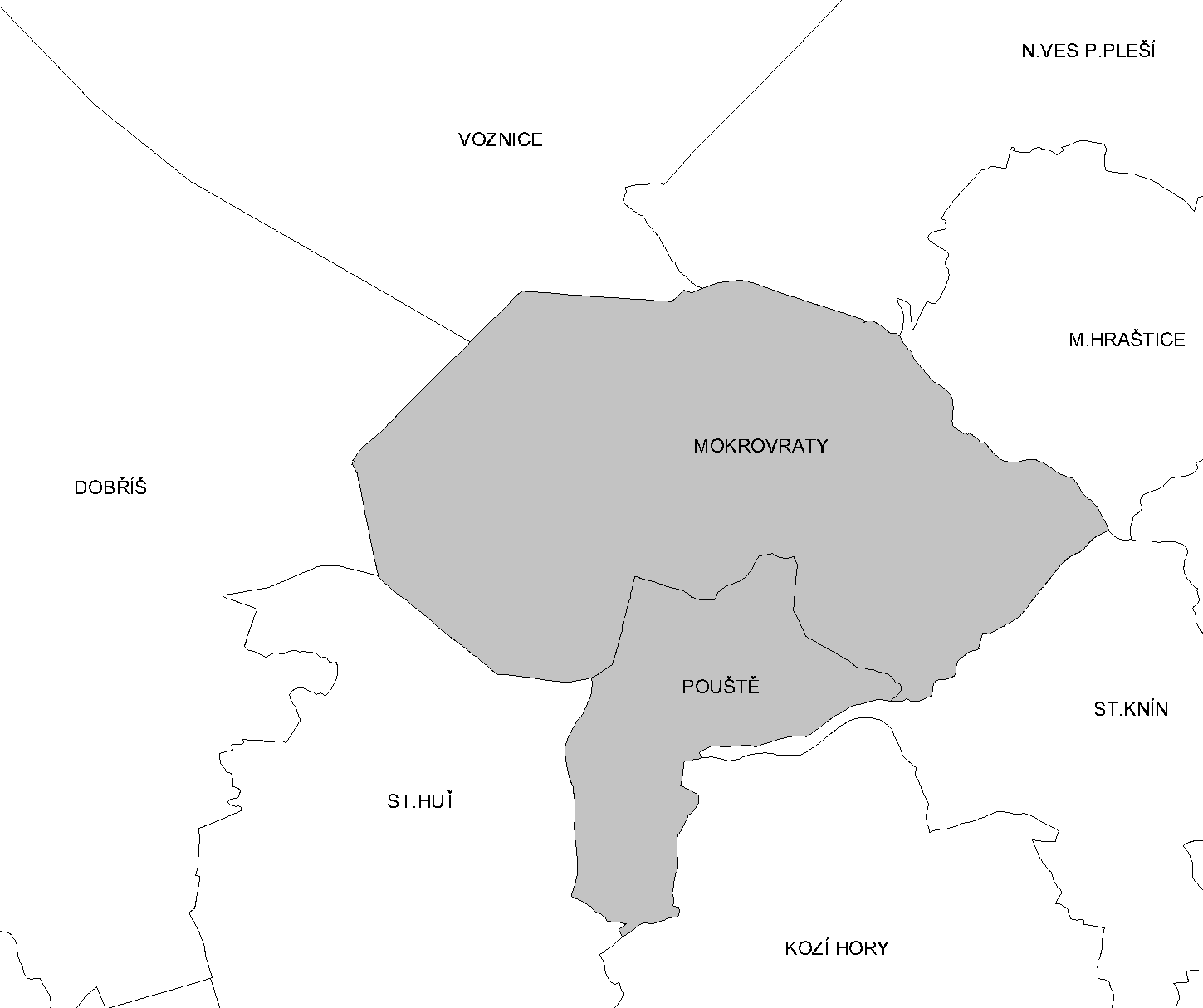 Katastr Mokrovrat